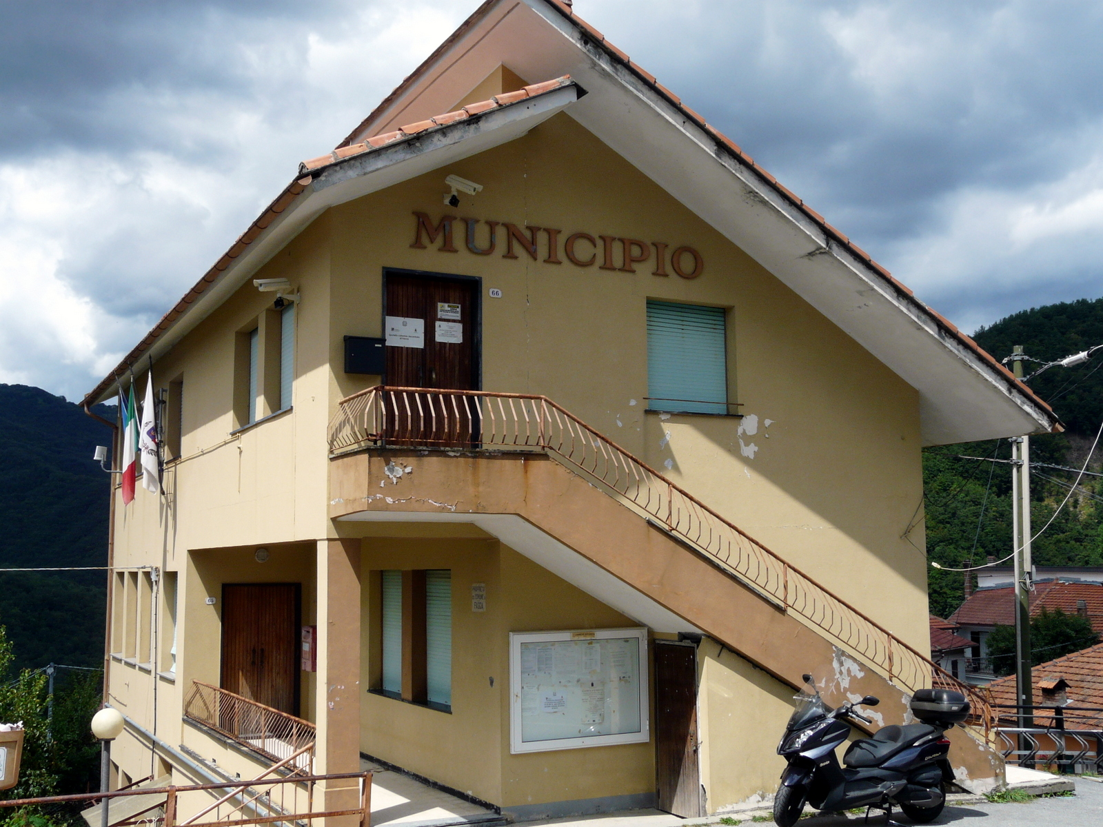 Il municipio a Carpeneto, Fascia, Liguria, Italia